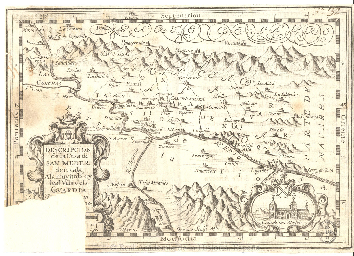 Es un mapa de la casa de San Meder, aparece además parte de Navarra, parte de Álava y parte de La Rioja, tal y como indica en el propio mapa: "Alava", "Parte de Navarra", "Parte de La Rioja". Publicado en el año 1678.